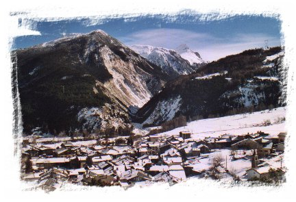 Village de Bramans en hiver